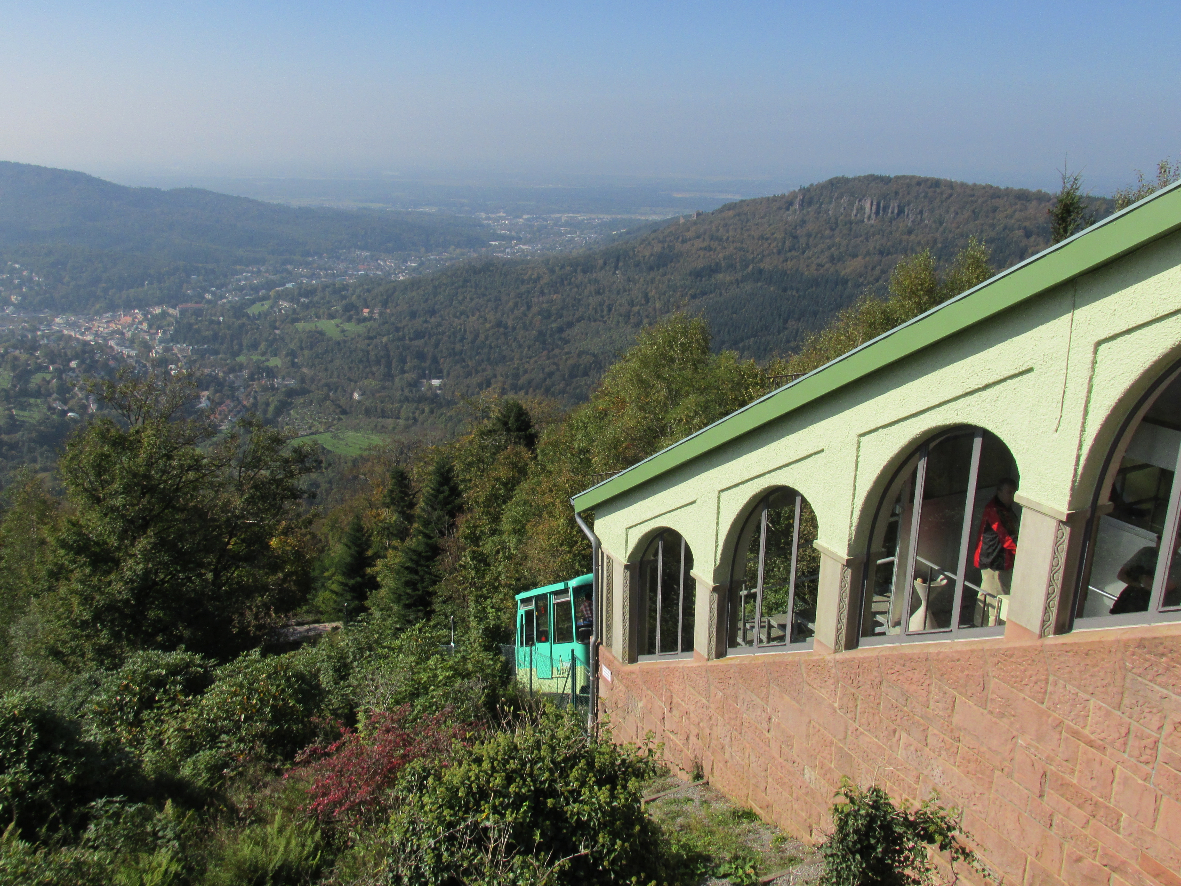 Merkur Bergbahn Station